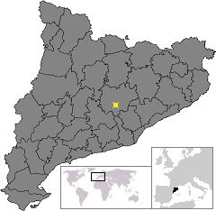 Localització de Manresa. Location of Manresa in Catalonia